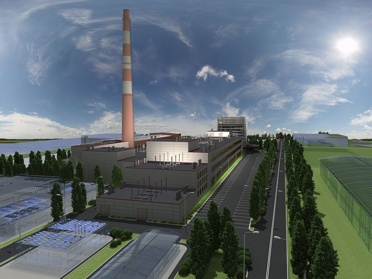 Проект дизайна ЛМЗ им. К. Либкнехта Санкт-Петербург